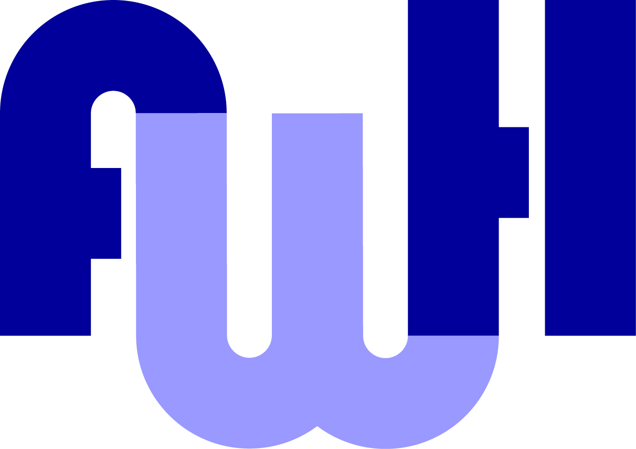 Logo AWH